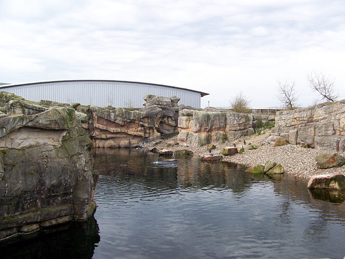 Penguin stay in Dierenpark Emmen